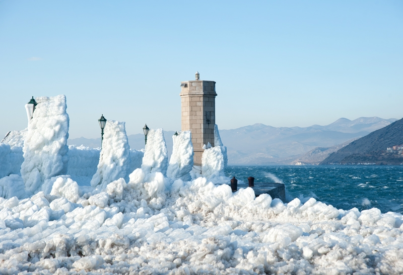 Senjska riva, Senj